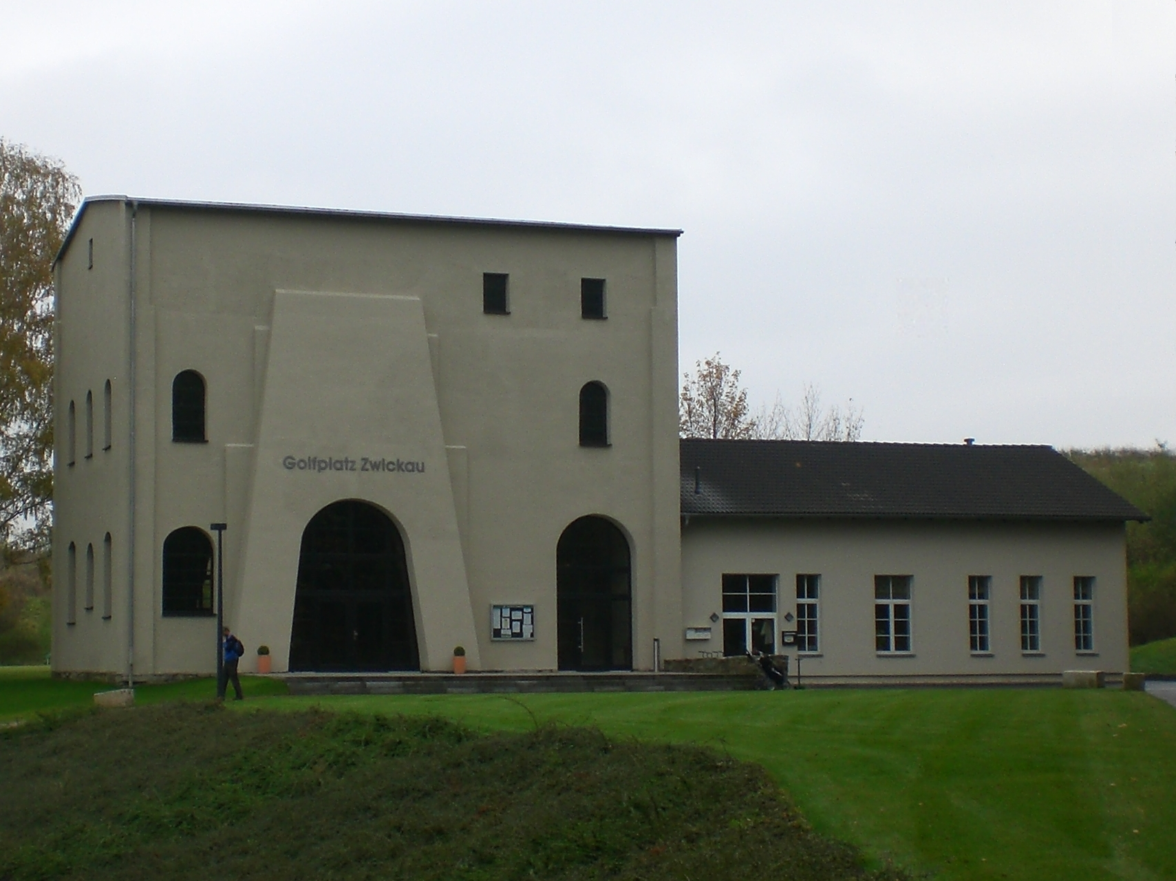 Treibe- und Maschinenhaus des Brückenberg-(Karl-Marx-)Schachtes IV, derzeit als Klubhaus des Golfklubs Zwickau umgenutzt. Zwickau, Sachsen, Deutschland.